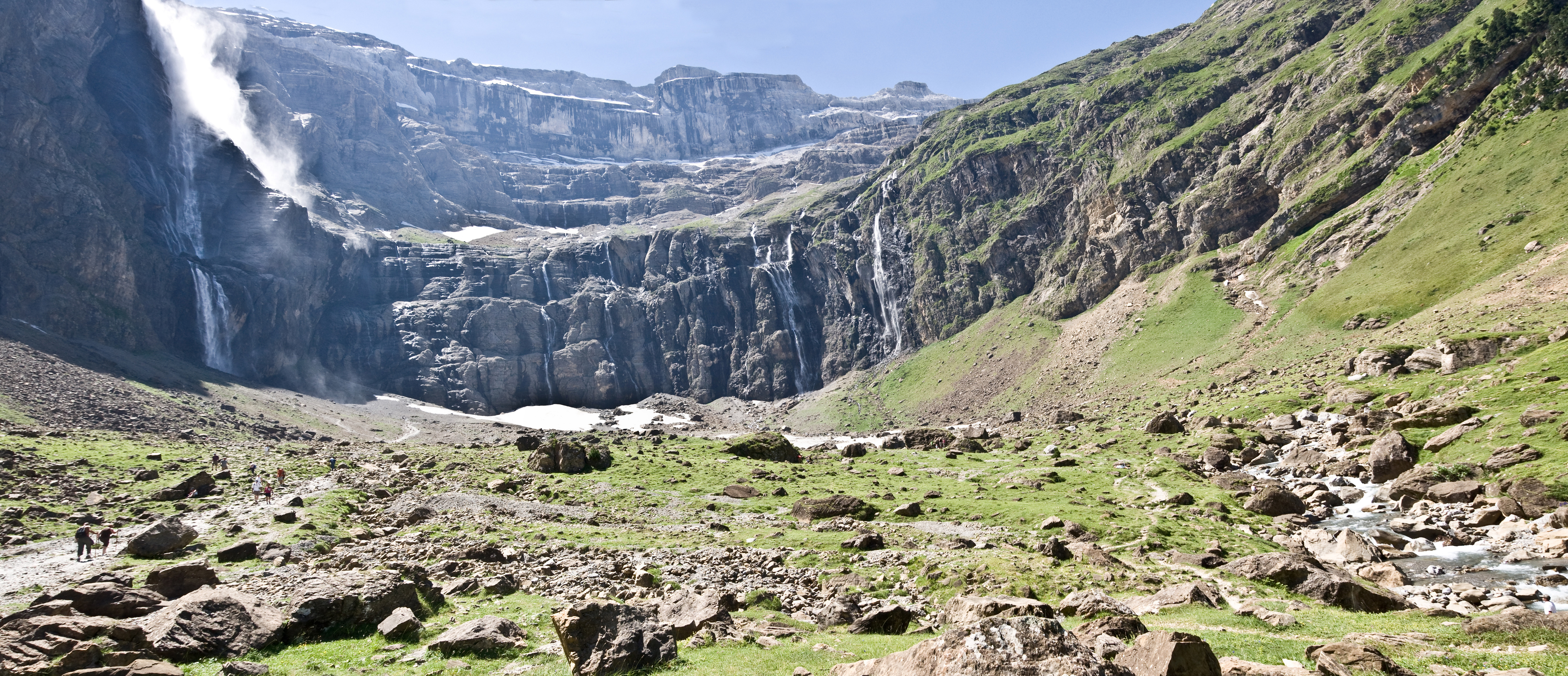 Cirque de Gavarnie, Hautes Pyrénées, France